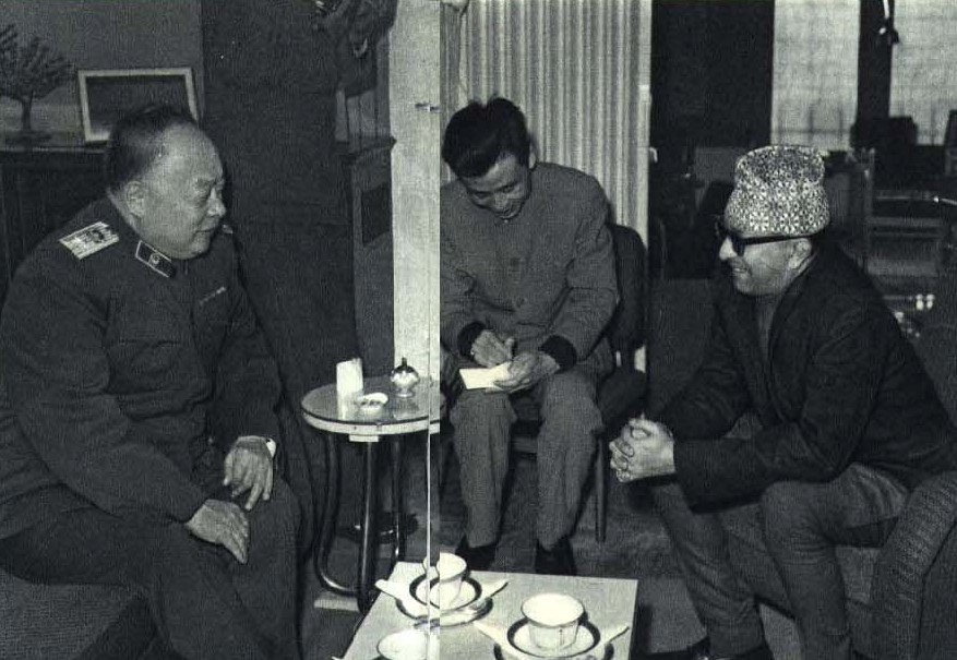 1965-6 1965年 陈毅访问尼泊尔，马亨德拉国王